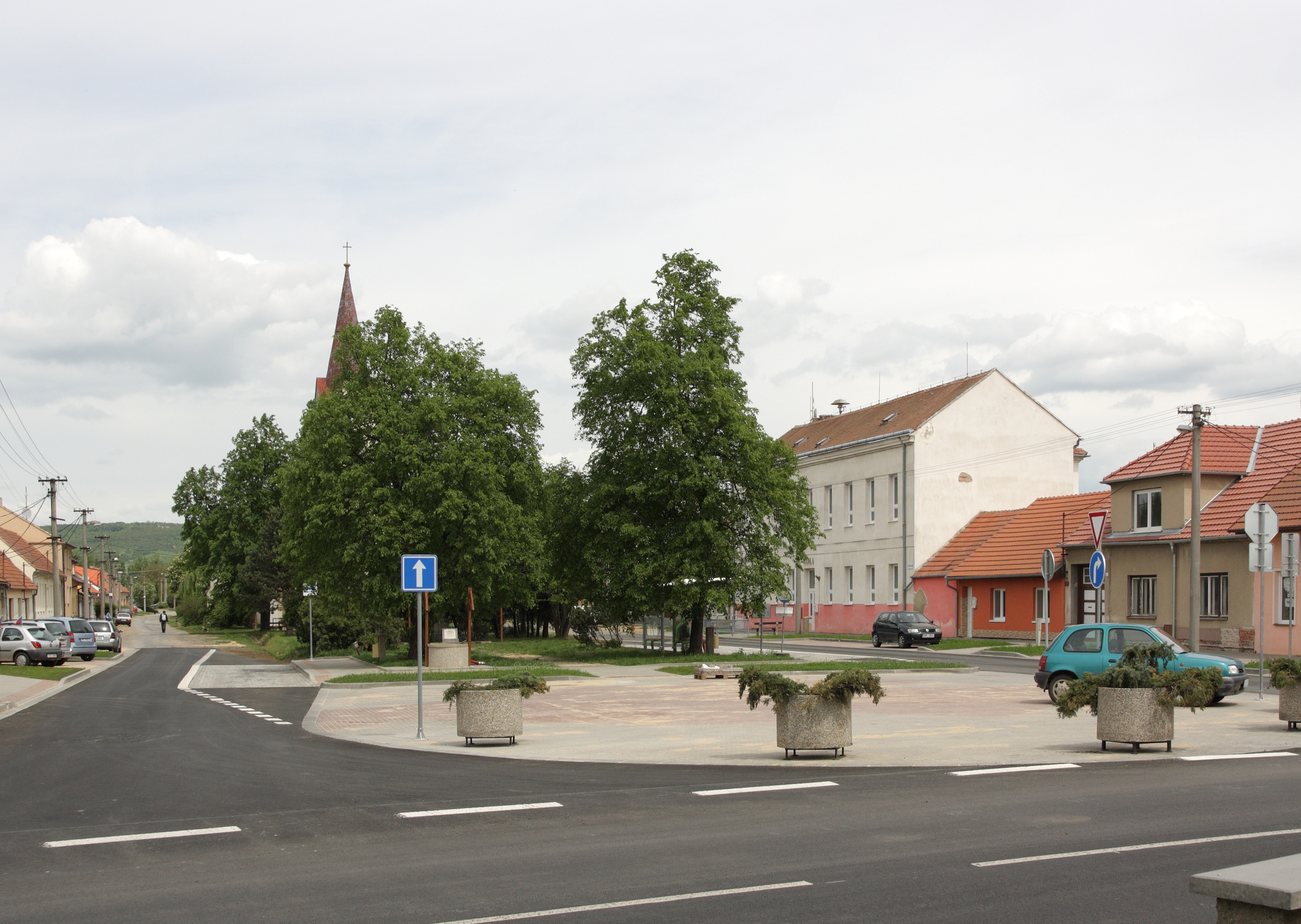 Přísnotice - náves.